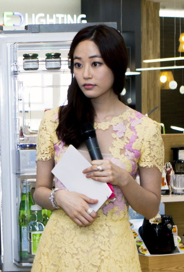 Lg전자가 26일 Lg 베스트샵 강남본점에서 ‘Lg디오스 수납 클래스’를 개최했다. 디오스 광고 모델 김효진(오른쪽) 씨와 수납 전문가 이영희씨가 Lg디오스 V9100 제품 앞에서 냉장고 수납 노하우를 소개하고 있다.